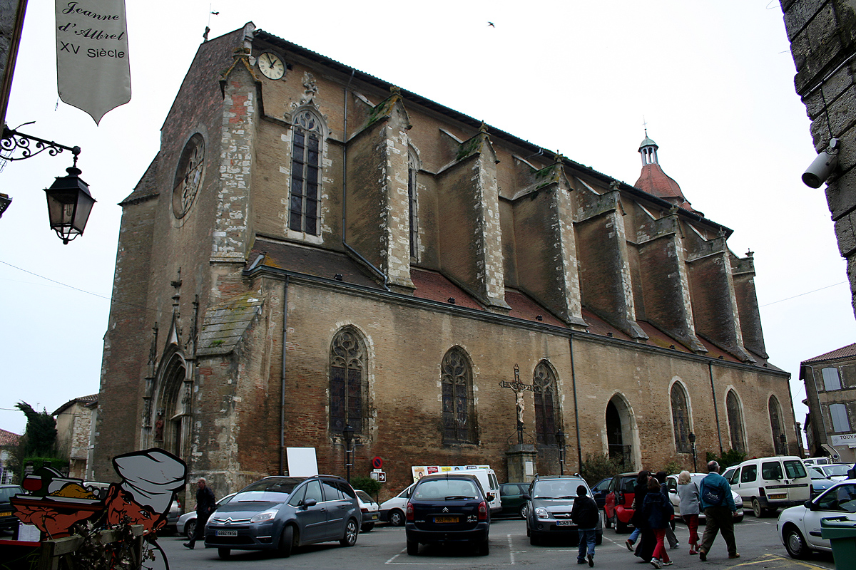 Eauze, Gers, France. Cathédrale Saint-Luperc.